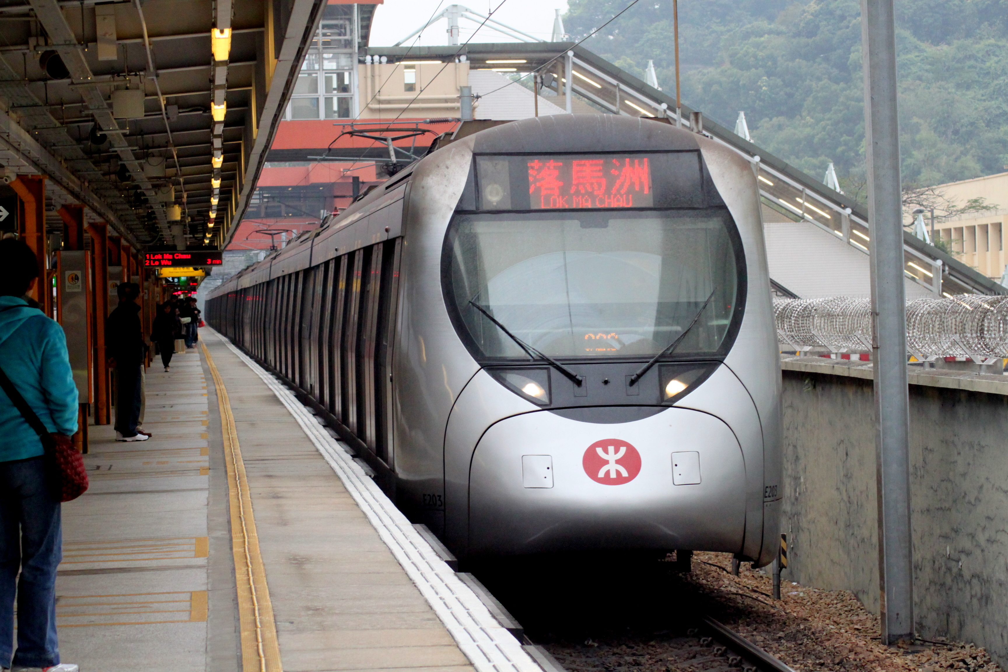 一列東鐵綫SP1900駛經火炭站